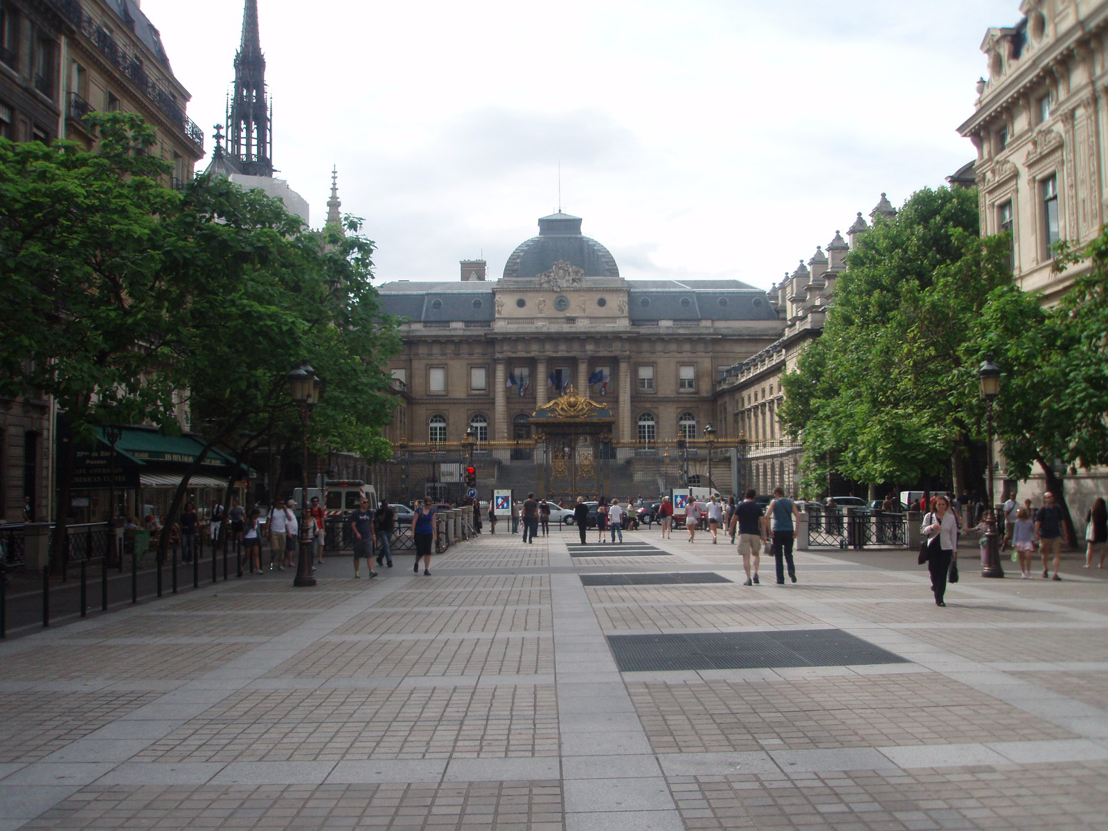 Palais de Justice de Paris